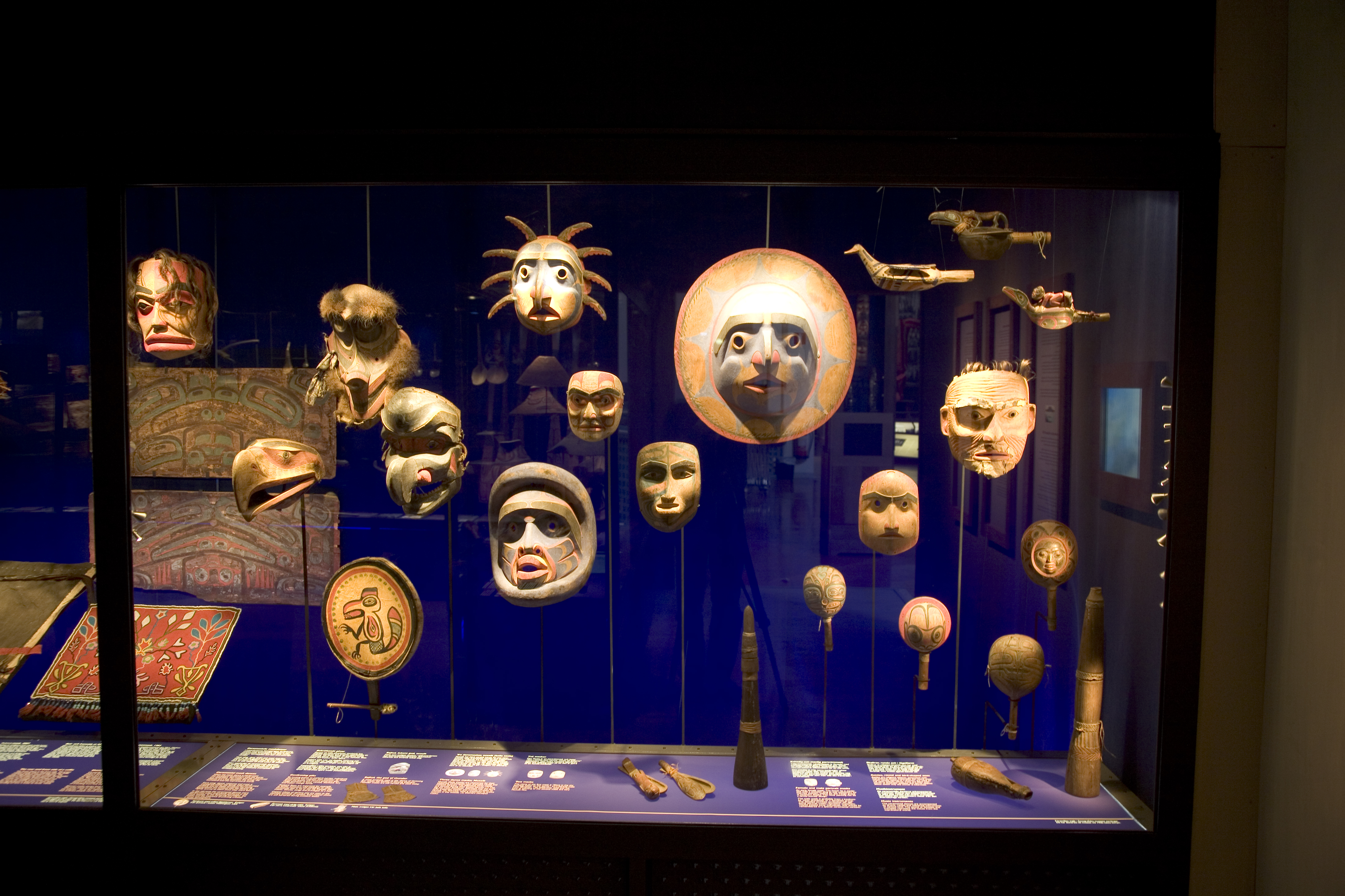 Monter med föremål från Nordvästkusten, British Columbia, Etnografiska museet, Stockholm. Bilden är tagen 2008, strax efter att utställningen öppnade. Många av föremålen i montern är insamlade av Gustaf Retzius 1893.